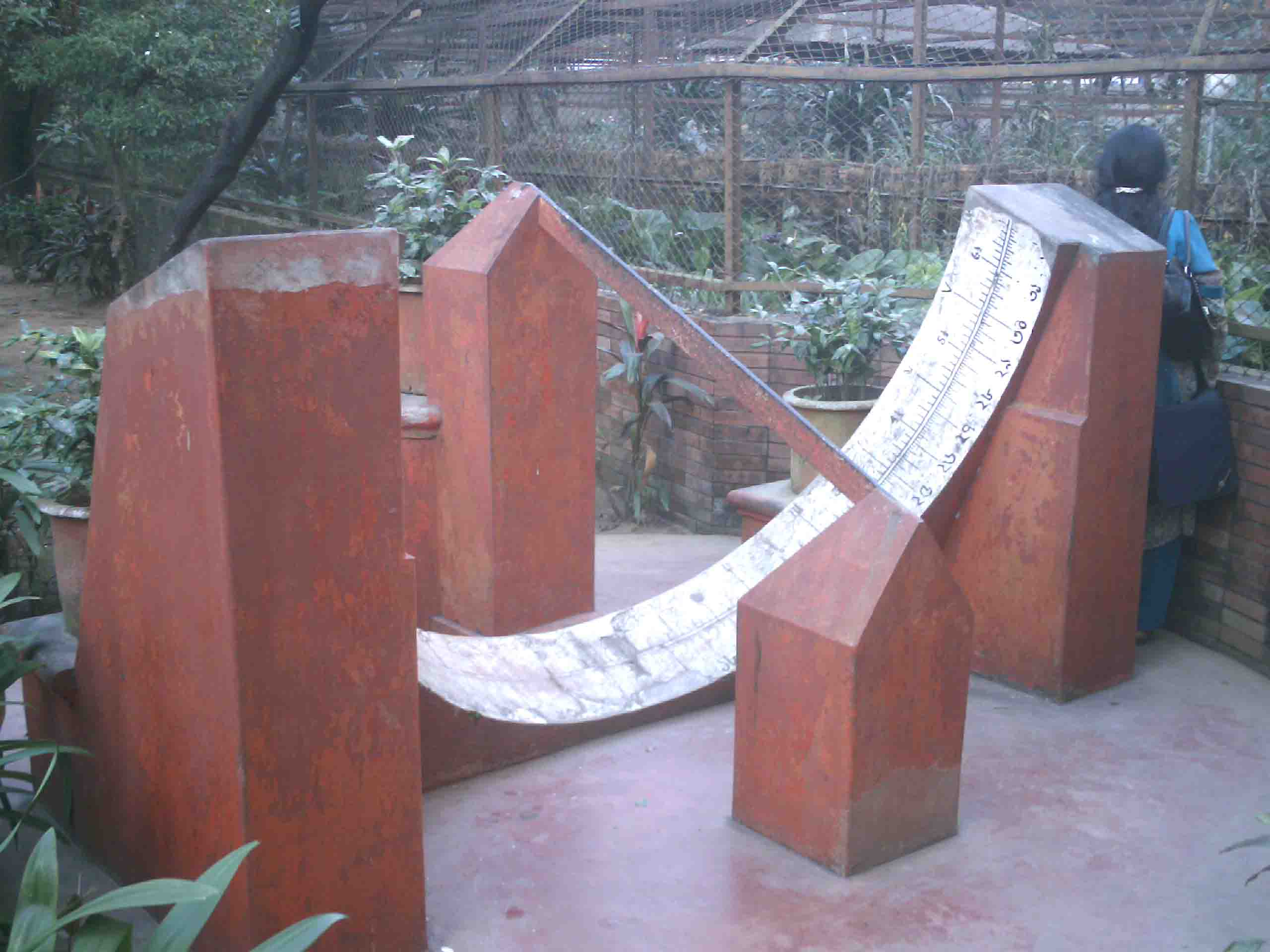 Baldha Garden's Sun watch, Dhaka, Bangladesh.